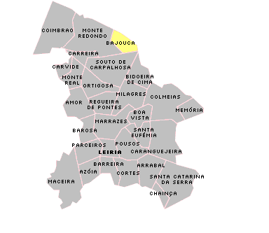 Localisation de Bajouca.PNG sur la freguesia de Leiria.